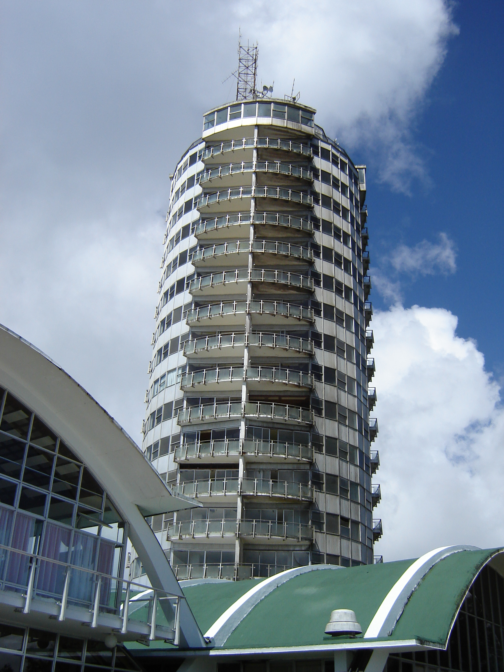 Hotel Humboldt, localizado en la Montaña Waraira Repano